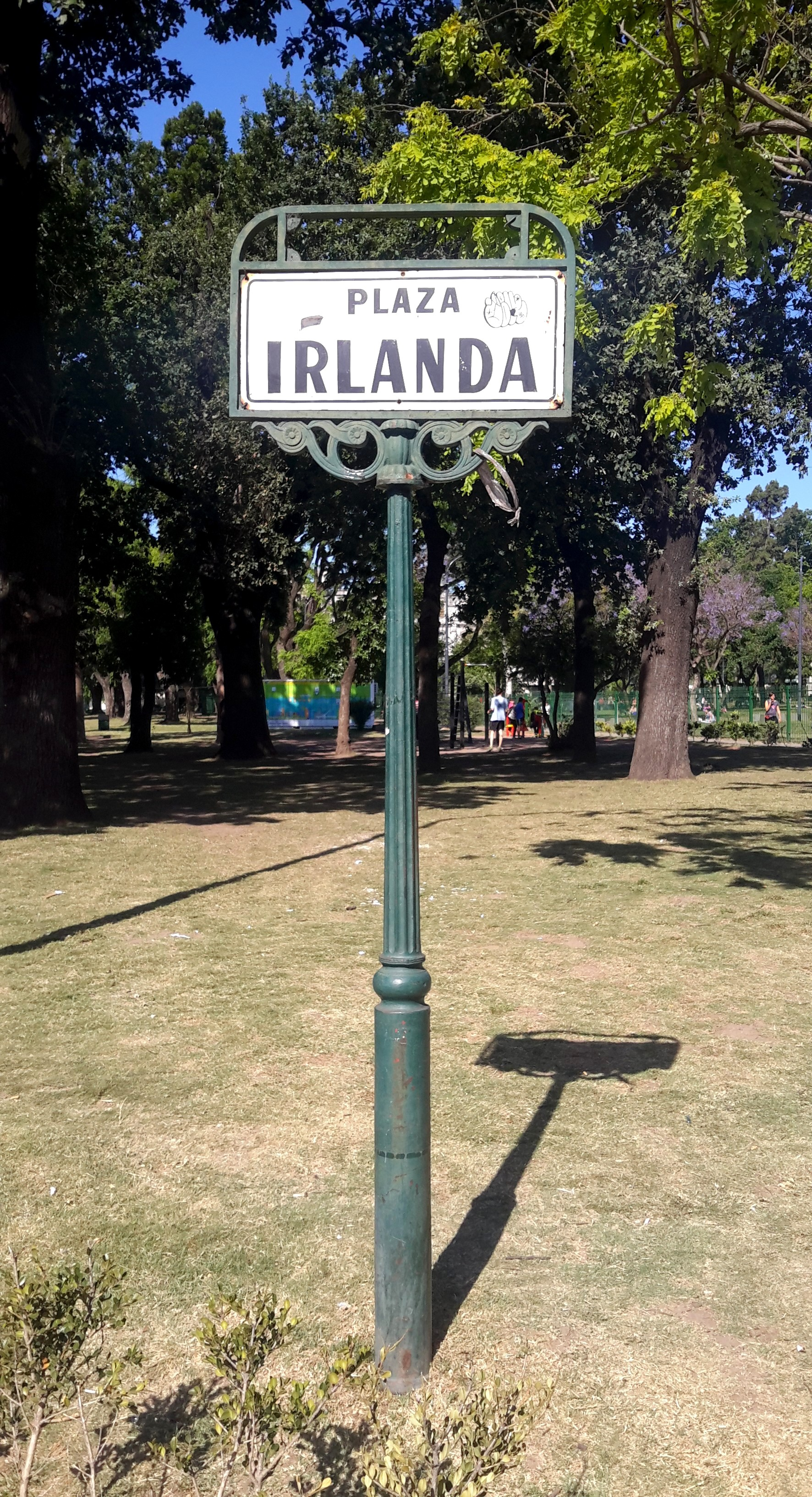 Plaza Irlanda, Caballito, Buenos Aires.